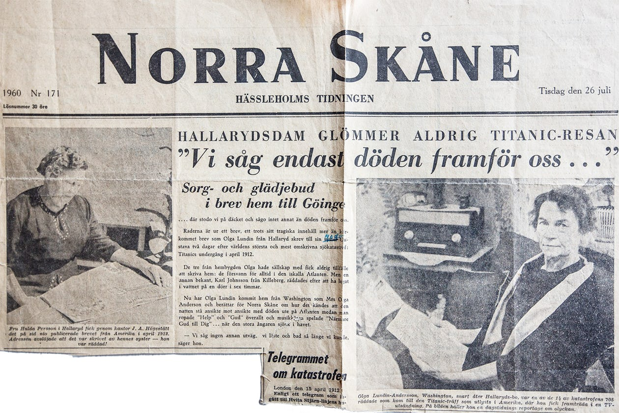 Efter Titanic och Olga hade återvänt till Sverige intervjuades hon av lokaltidningen Norra Skåne år 1960